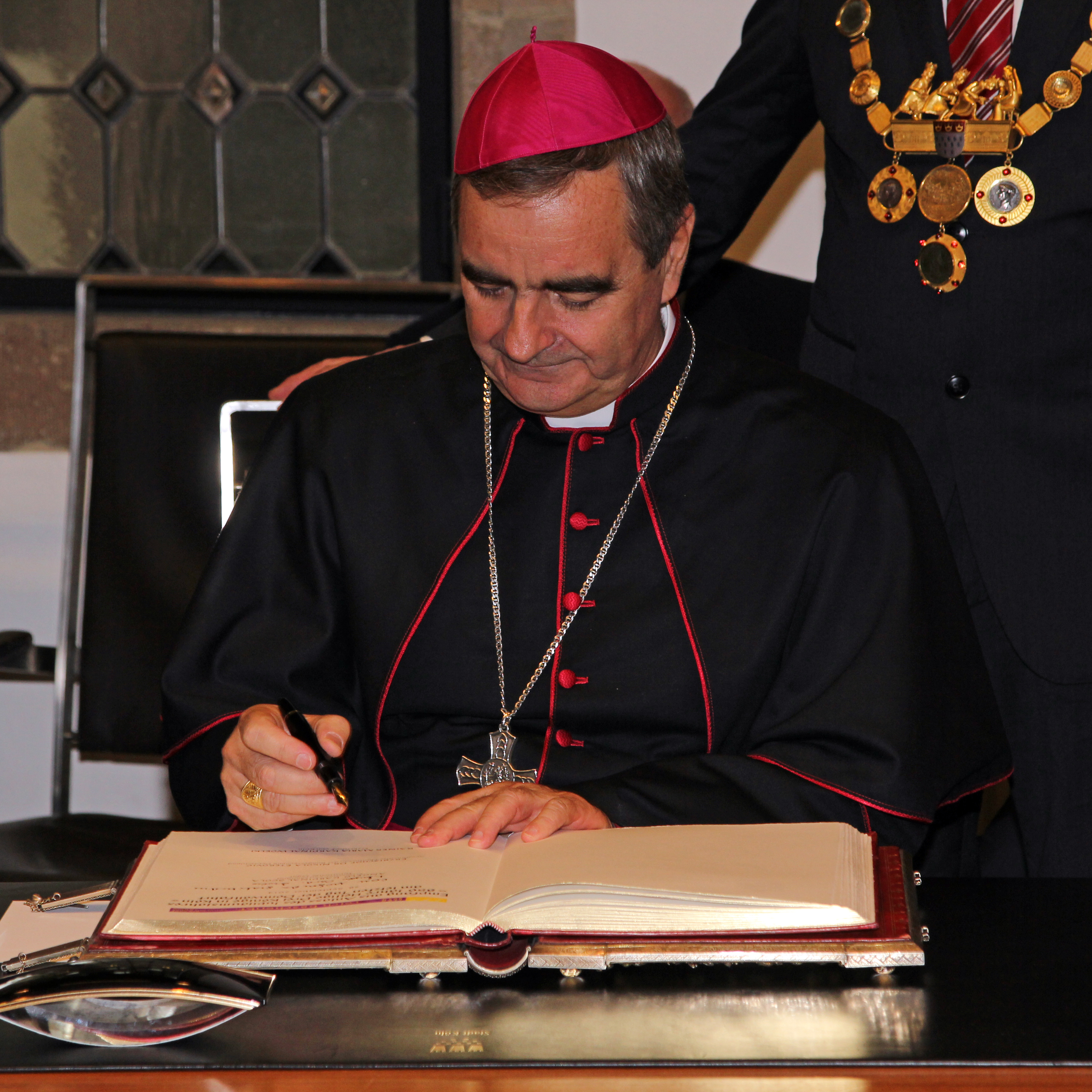 Empfang im Kölner Rathaus zur Amtseinführung des neuen Kardinals Rainer Maria Woelki am 28. September 2014 Foto: Foto: Nikola Eterović beim Eintrag ins goldene Buch der Stadt Köln